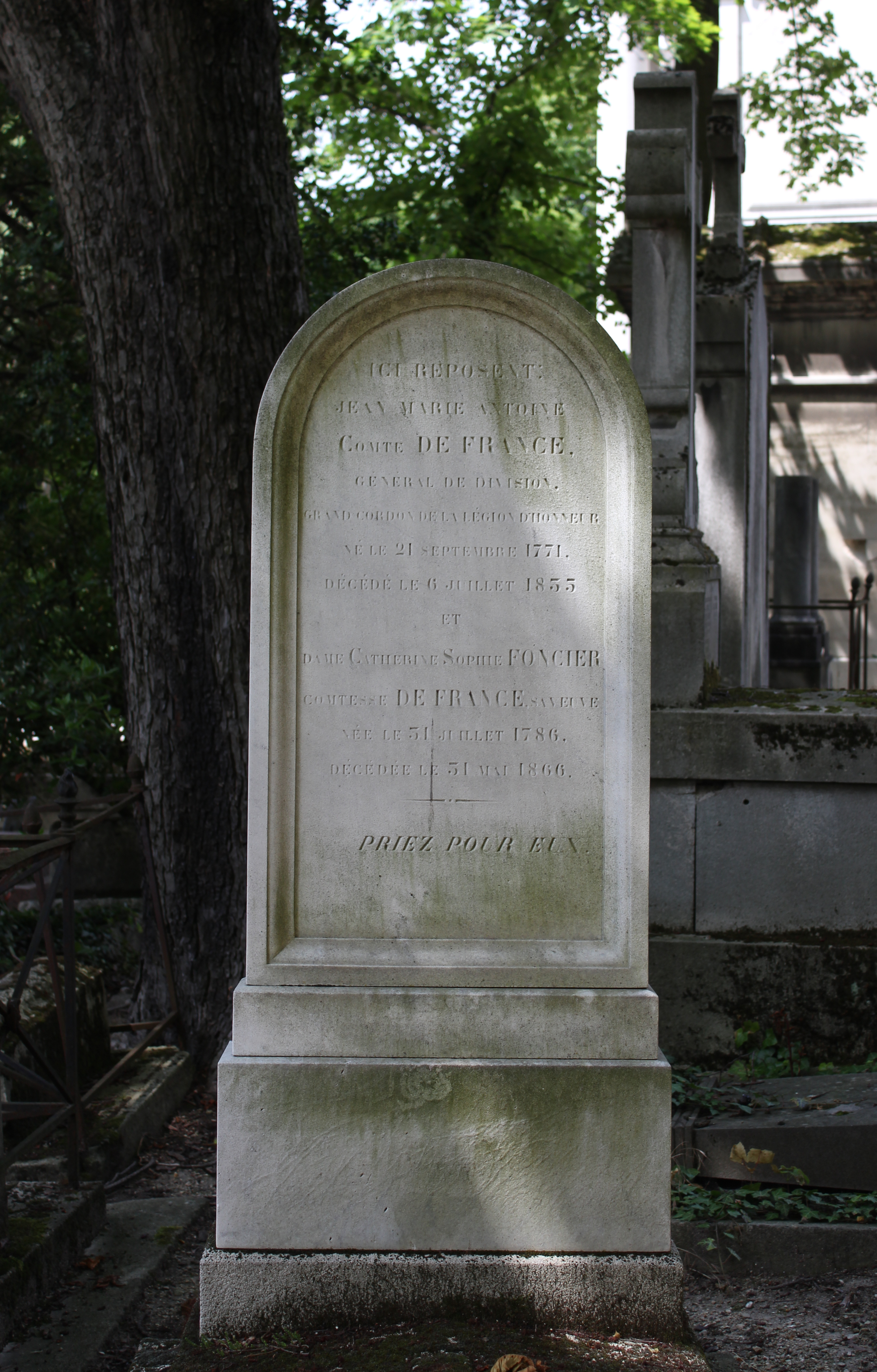 inscriptions